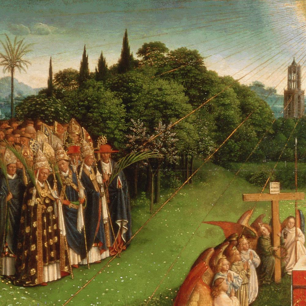 retable de l'Agneau mystique